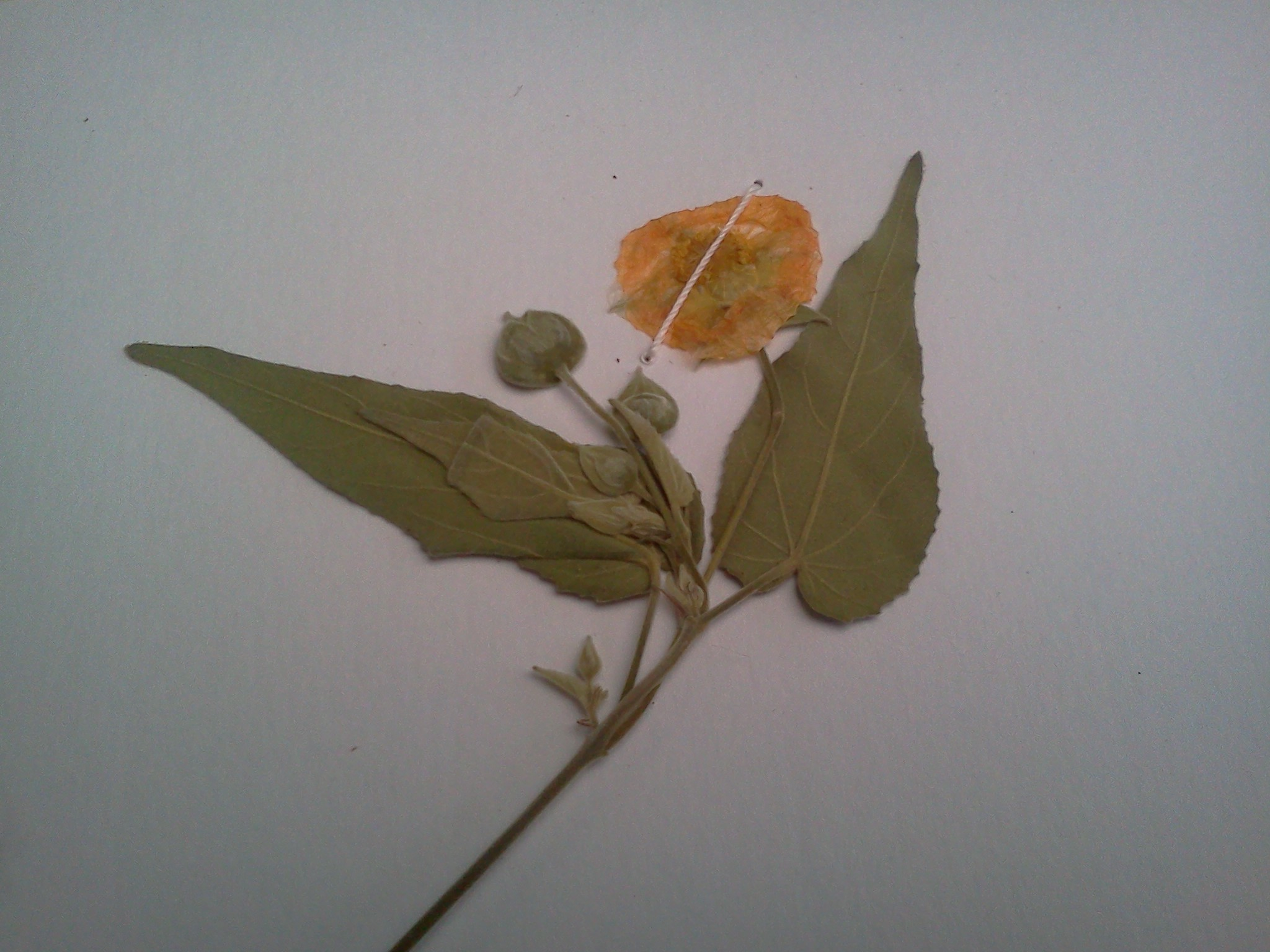 Ejemplar conservado de G. mutisiana encontrado en el Herbario Luis Sigifredo Espinal Tascón de la Universidad del Valle